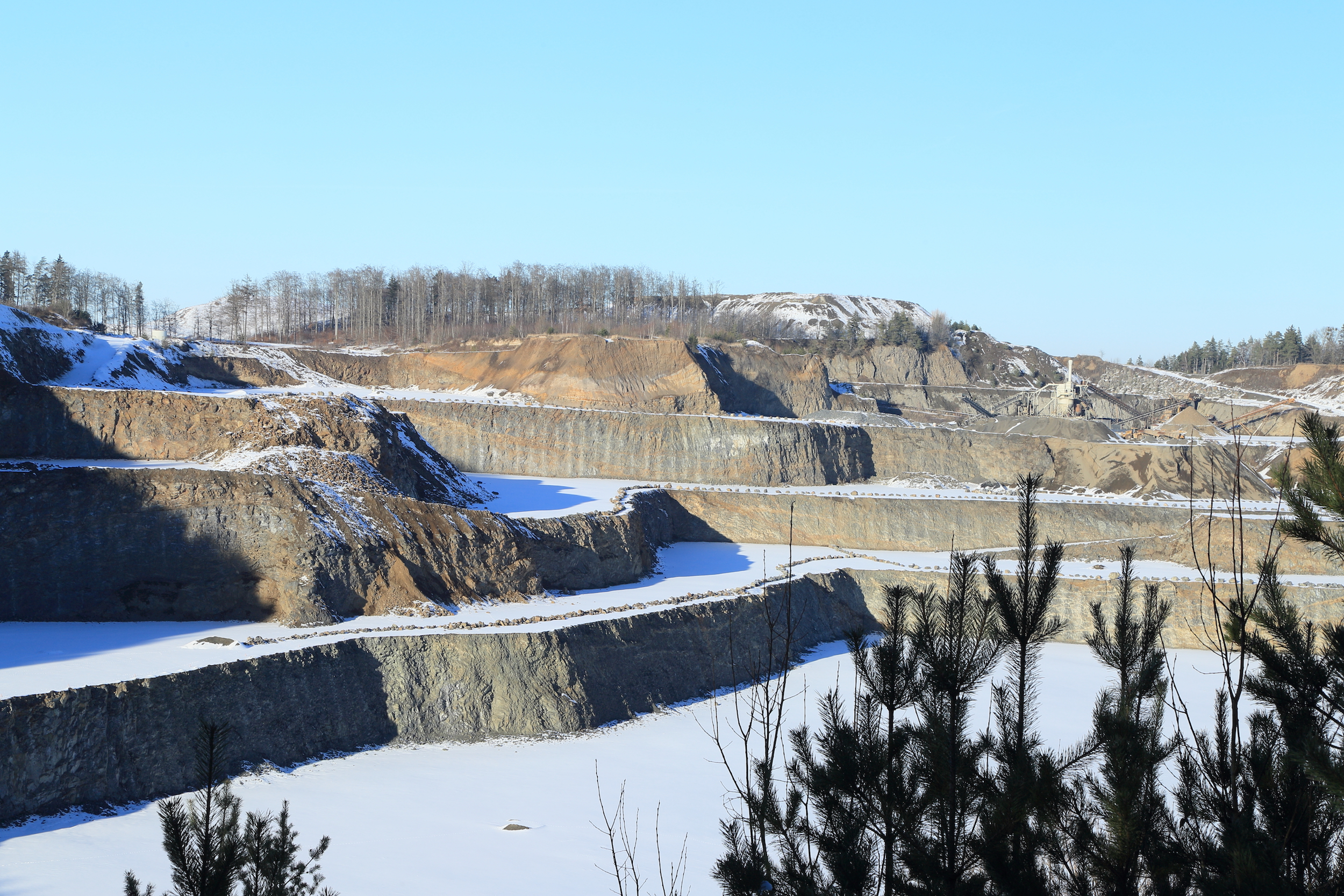 Basaltbruch "Zeilberg" E von Maroldsweisach Geotop-Nummer: 674A017 5830GT000005 Maroldsweisach Haßberge 5830 Pfarrweisach R: 4406044 H: 5562558 460 m ü.NN L: 1000 m, B: 500 m, H: 50 m